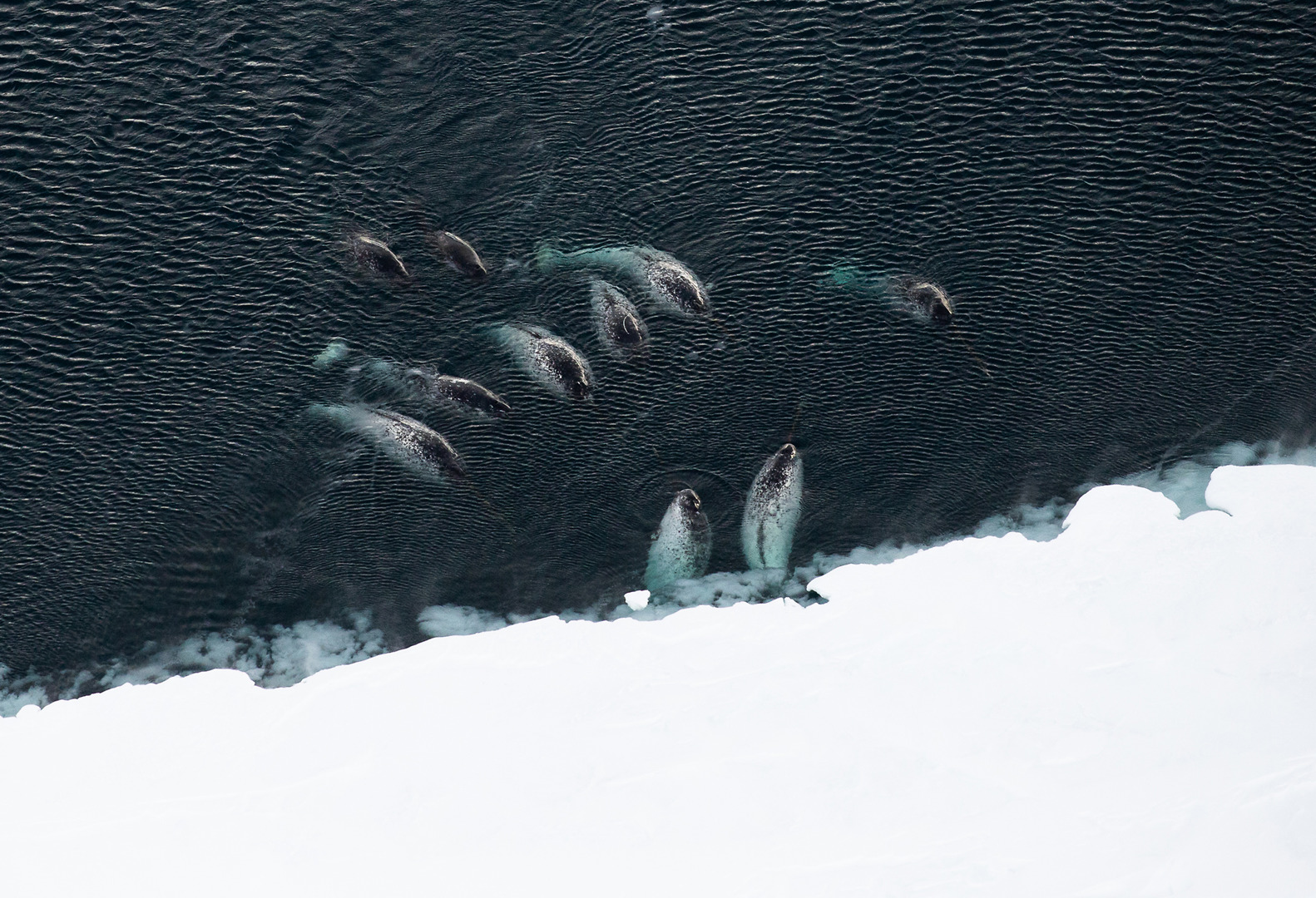 В июне 2019 г. во время авиационных разведок исследователи проекта "Нарвал. Легенда Арктики" зафиксировали 30 особей нарвалов в северной части архипелага у островов Карла-Александра и Джексона.